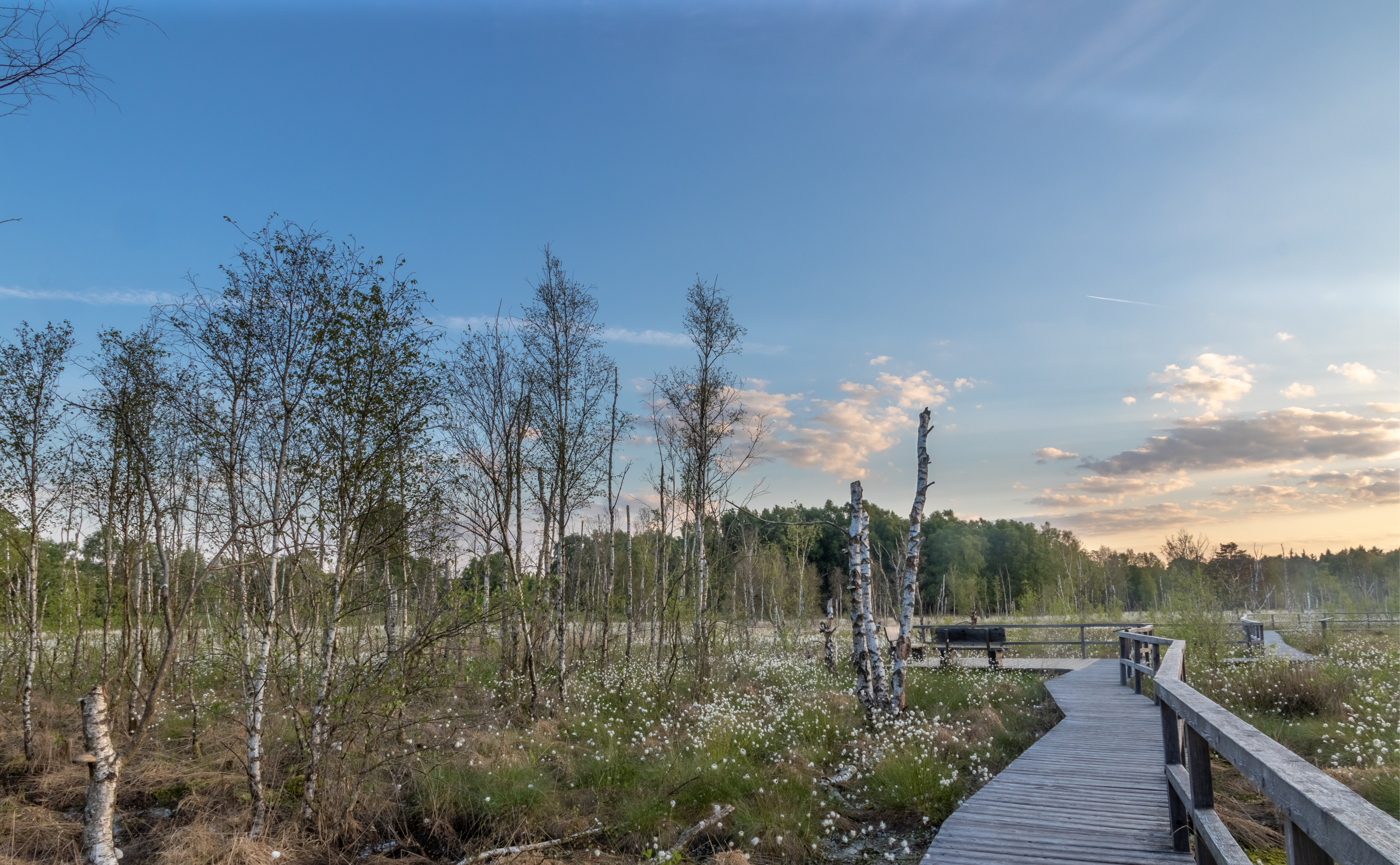 Sonnenaufgang im Dosenmoor